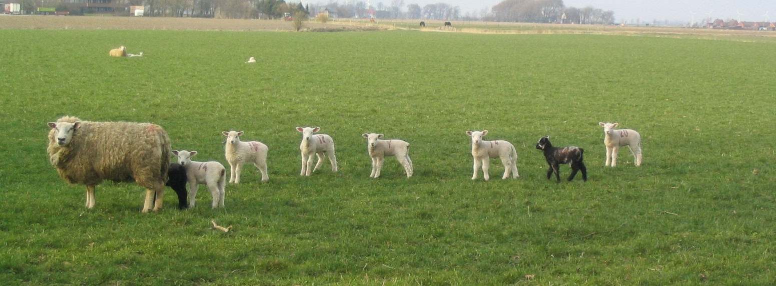 Little Sheep close to Wesselburener Deichhausen, Dithmarschen